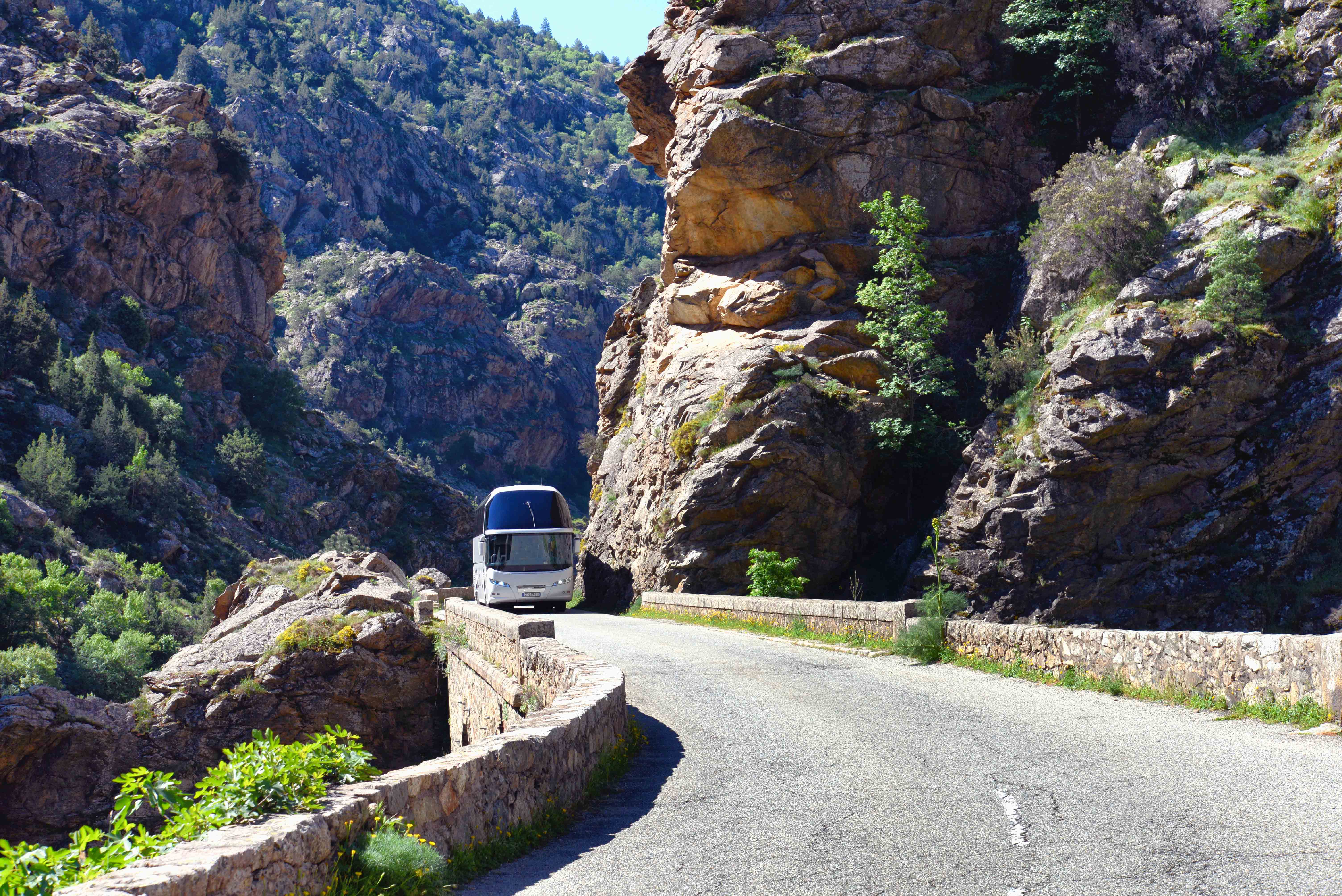 Corscia, Niolo (Haute-Corse) - La route D84 (ex route forestière n° 9 construite en 1853, terminée en 1896, pour désenclaver le Niolo) dans la traversée du défilé de la Scala di Santa Regina.